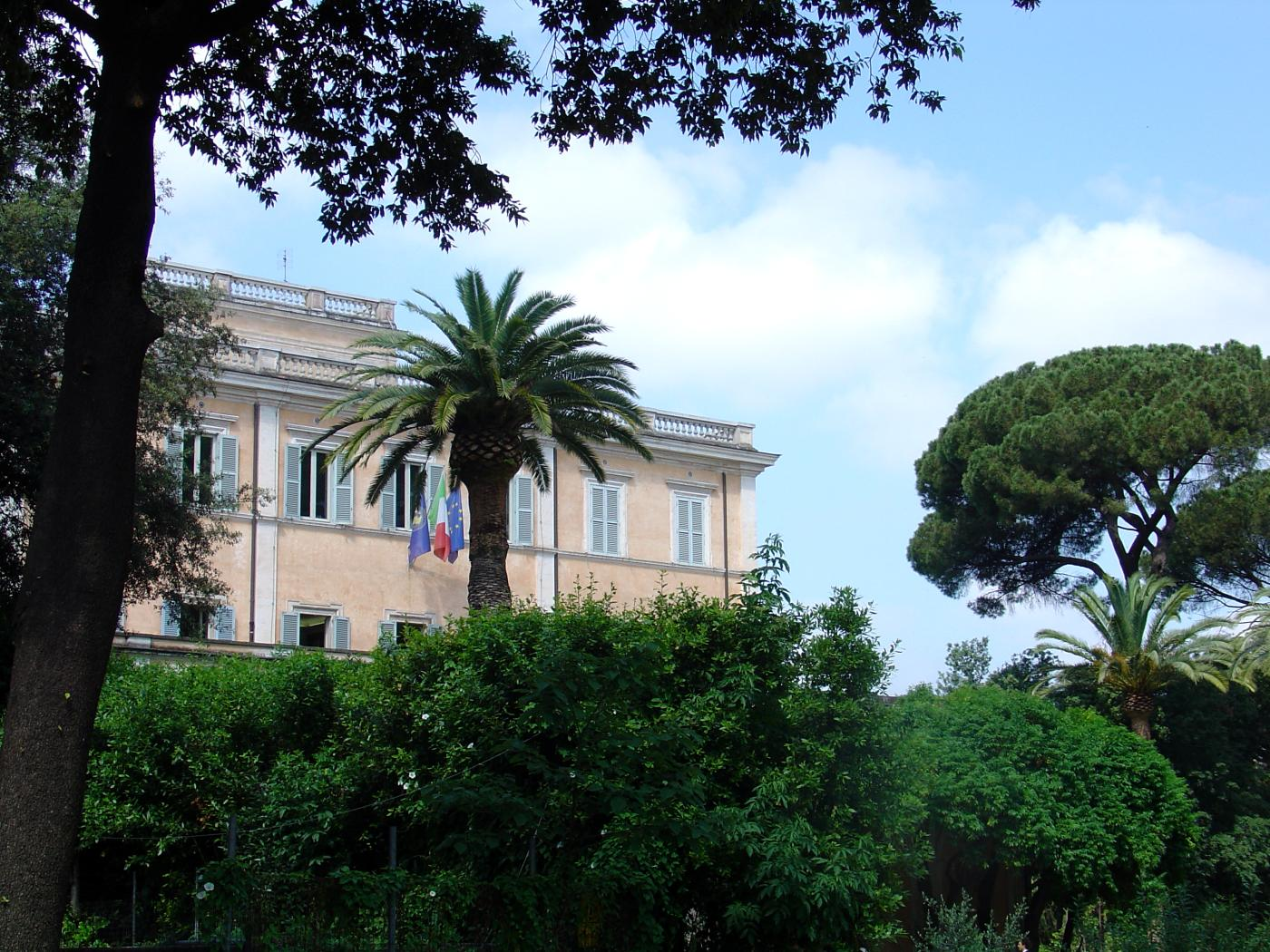 Palazzetto Mattei, sede della Societa geografica italiana, Roma, Villa Celimontana.